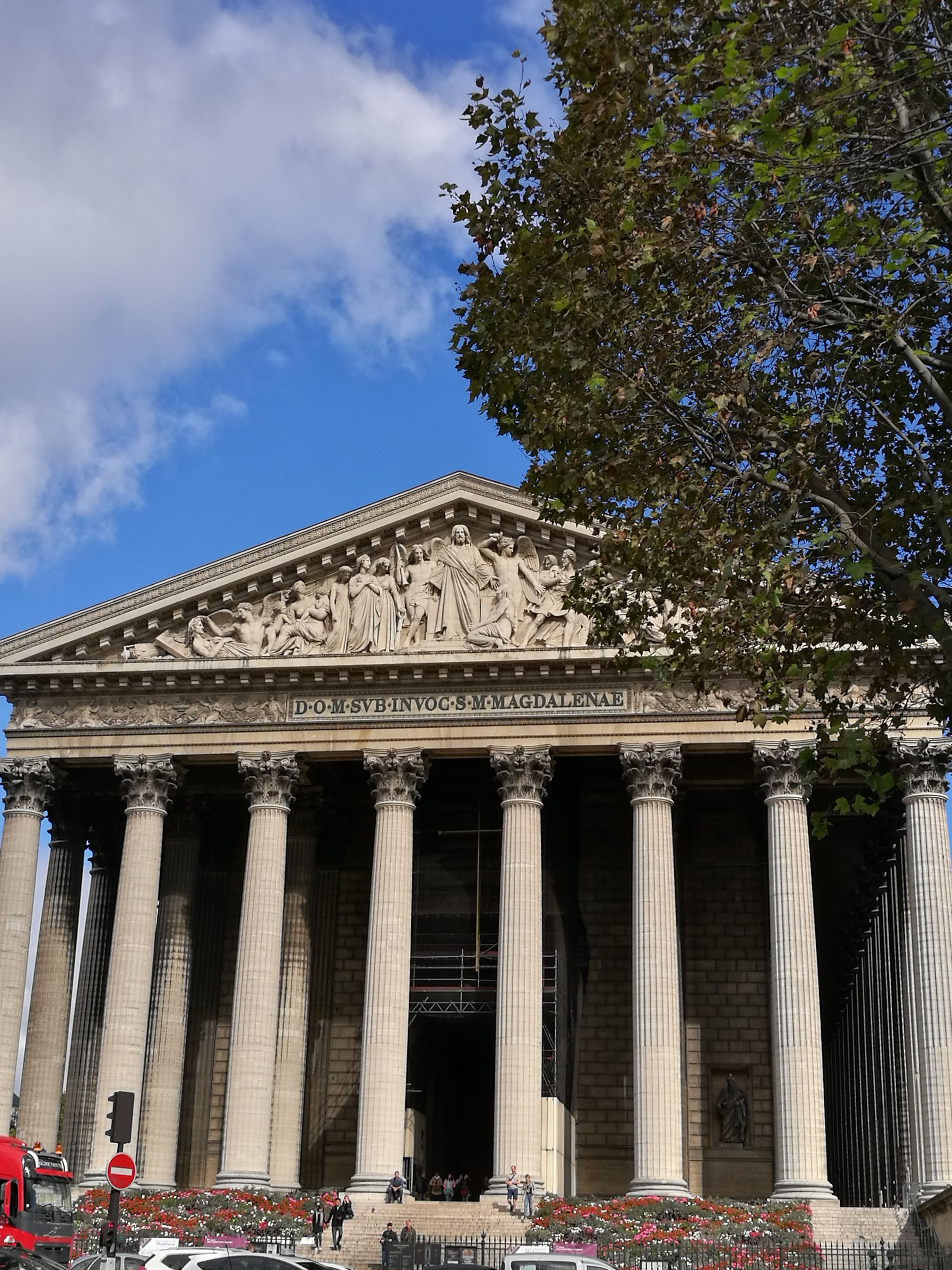 La Madeleine_Paris_Fassade